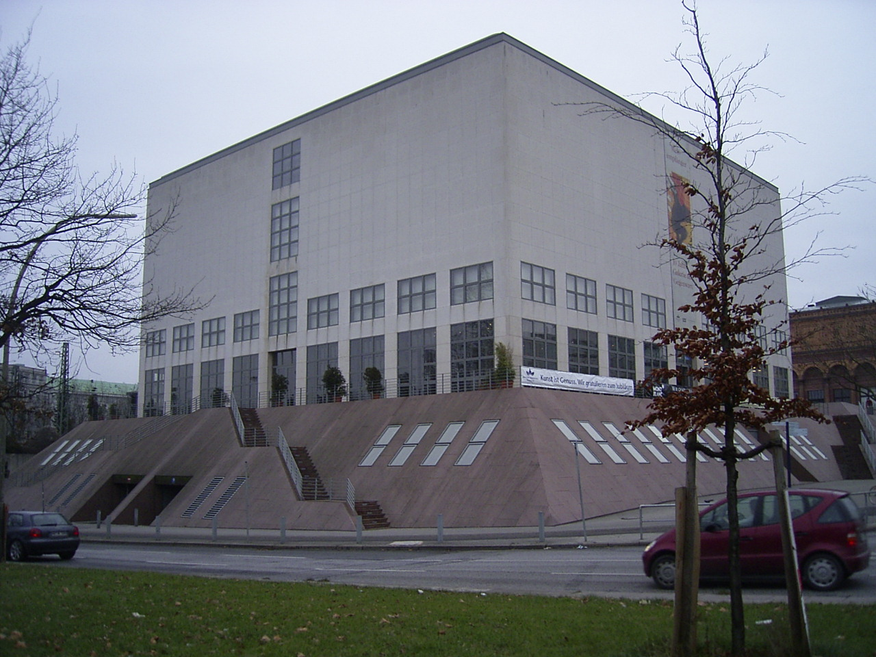 Die Galerie der Gegenwart in Hamburg-Altstadt wurde in den 1990er Jahren nach Plänen von Oswald Mathias Ungers als Erweiterungsbau für die Hamburger Kunsthalle errichtet.